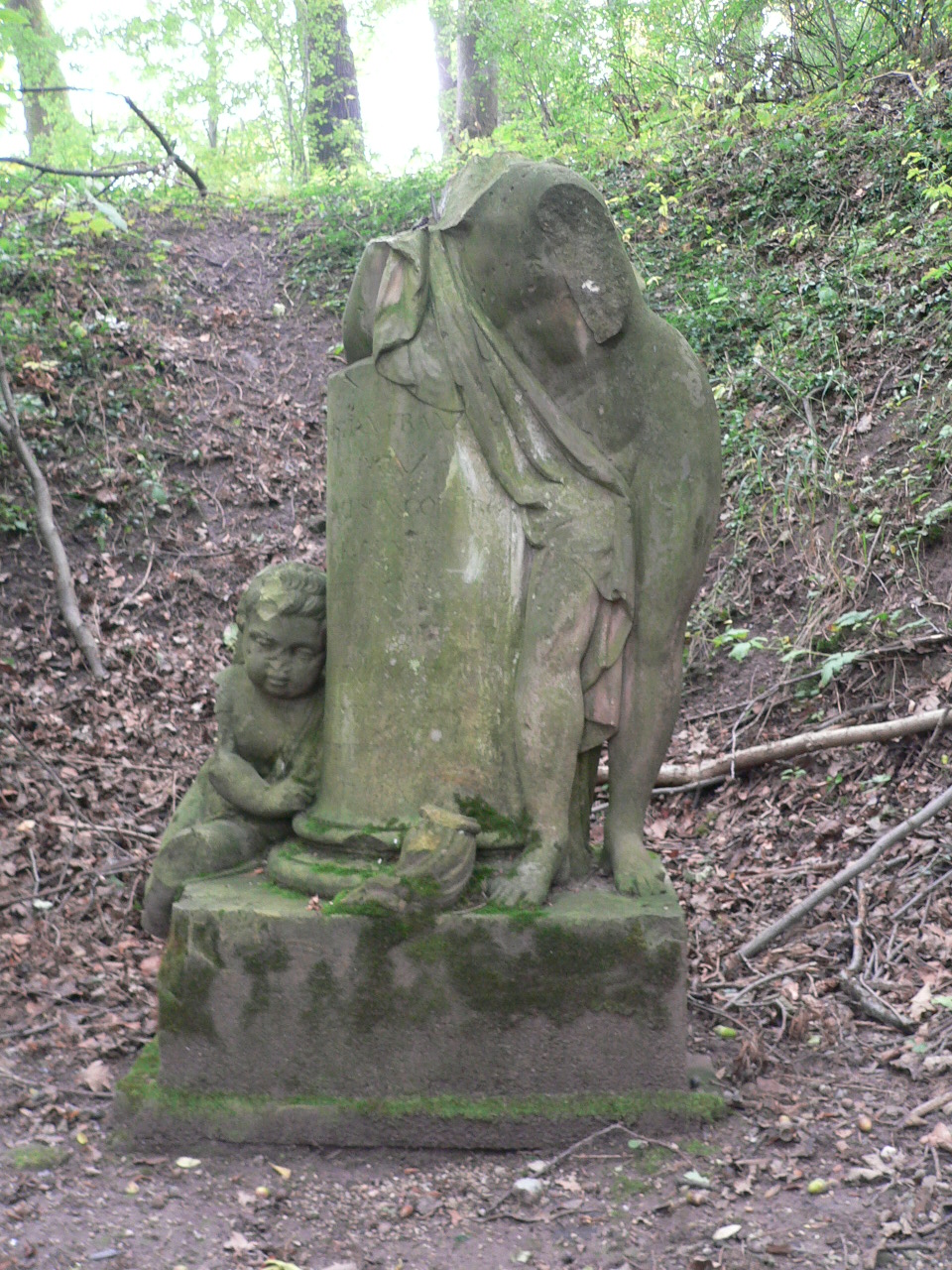 Gedächtnismal für Prinz Christian Franz (†1797) von Sachsen-Coburg und Gotha im Bergpark von Schloss Falkenegg (Coburg)